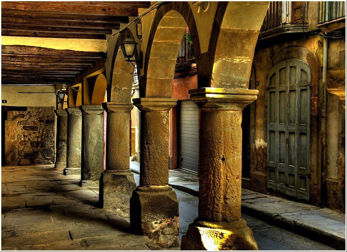 El Carrer Major de Ponts va des de la plaça Planell, situada al centre de la vila, fins a la plaça de l’Església, ubicada en un dels extrems de Ponts. Aquest carrer ha tingut sempre un caràcter menestral. Fins no fa gaire era habitat per artesans i comerciants que feien servir les plantes de les cases com a tallers o botigues. També hi tenien la residència professionals lliberals com metges, apotecaris, menestrals o notaris. Ara ja són pocs els comerciants que hi donen vida pròpia.